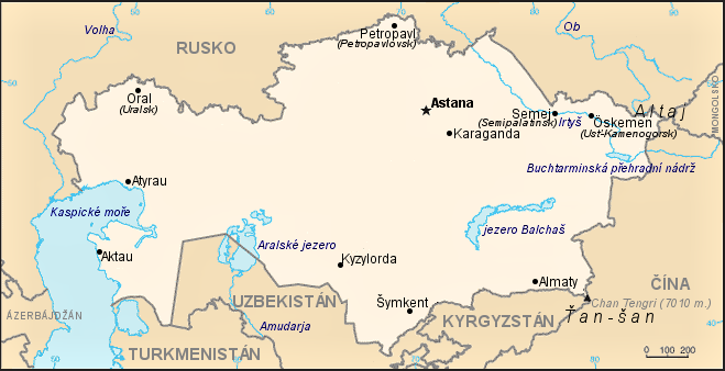 Orientační mapa Kazachstánu.